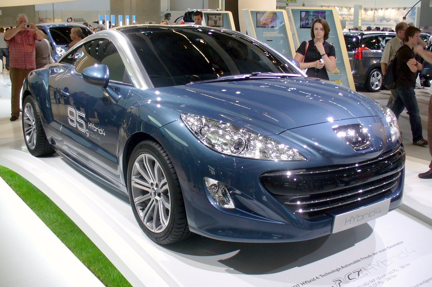 Peugeot RCZ